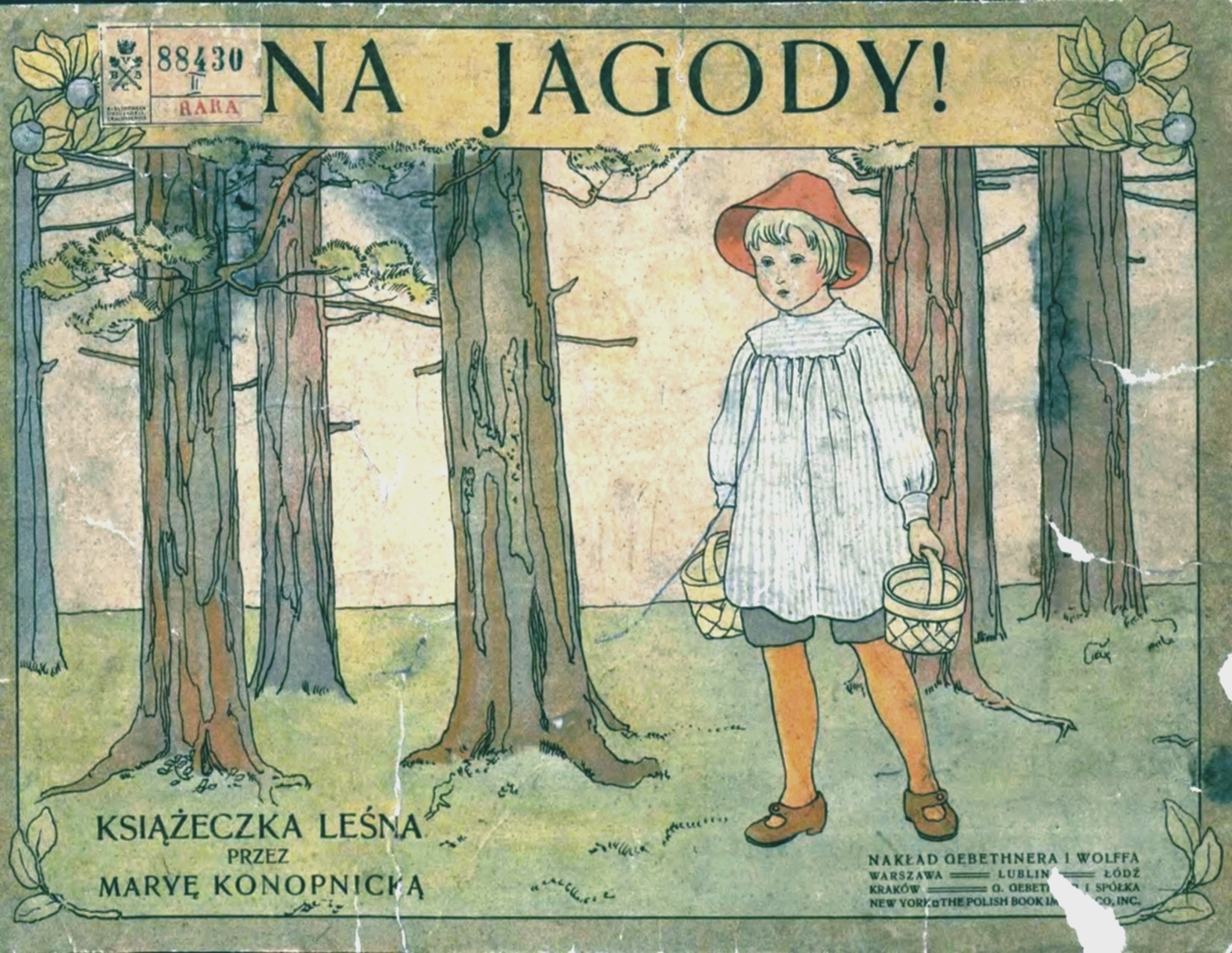 skan grafiki z książki PL publikacja Wydawnictwo Gebethnera i Wolffa Warszawa 1913